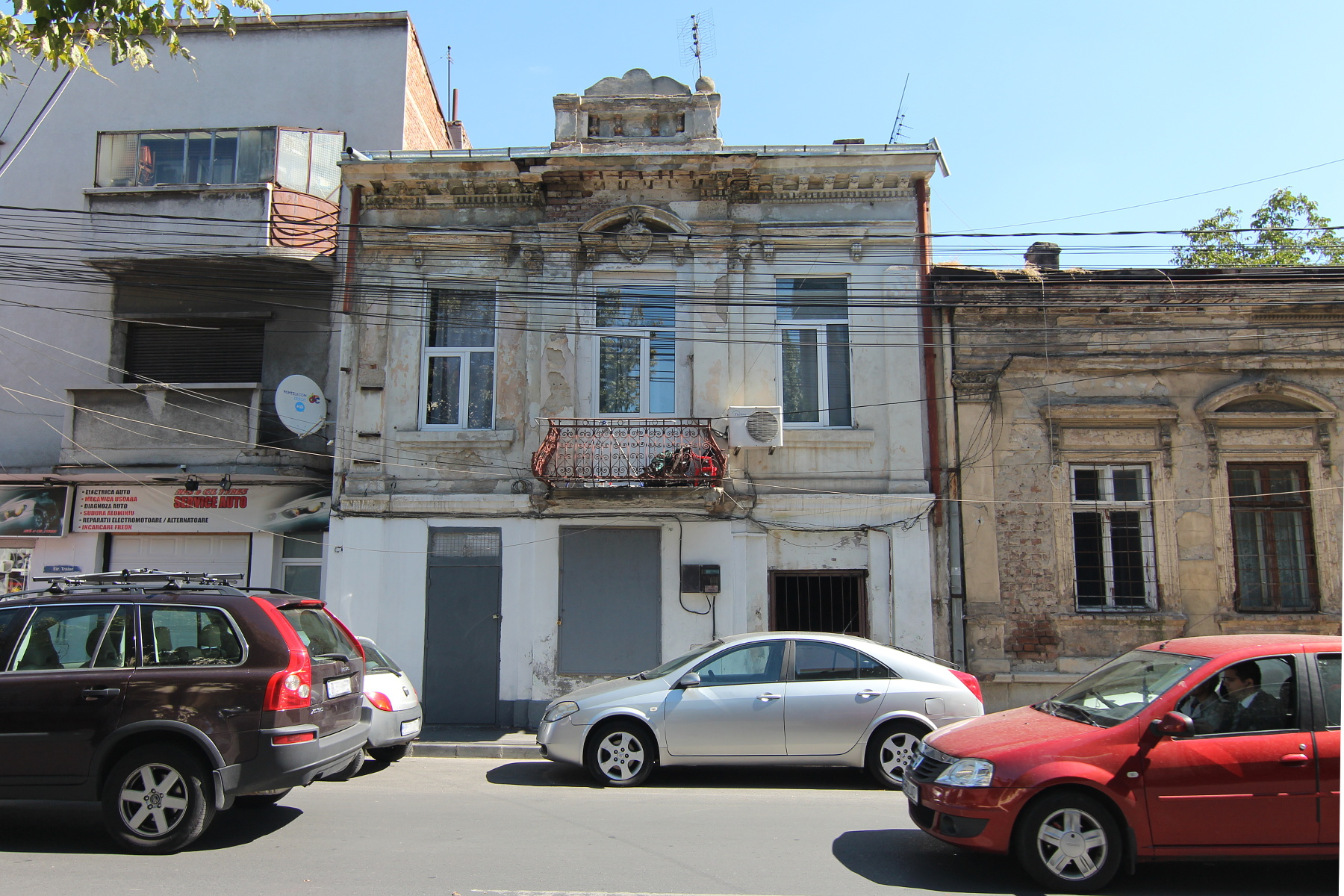 Casă pe strada Traian